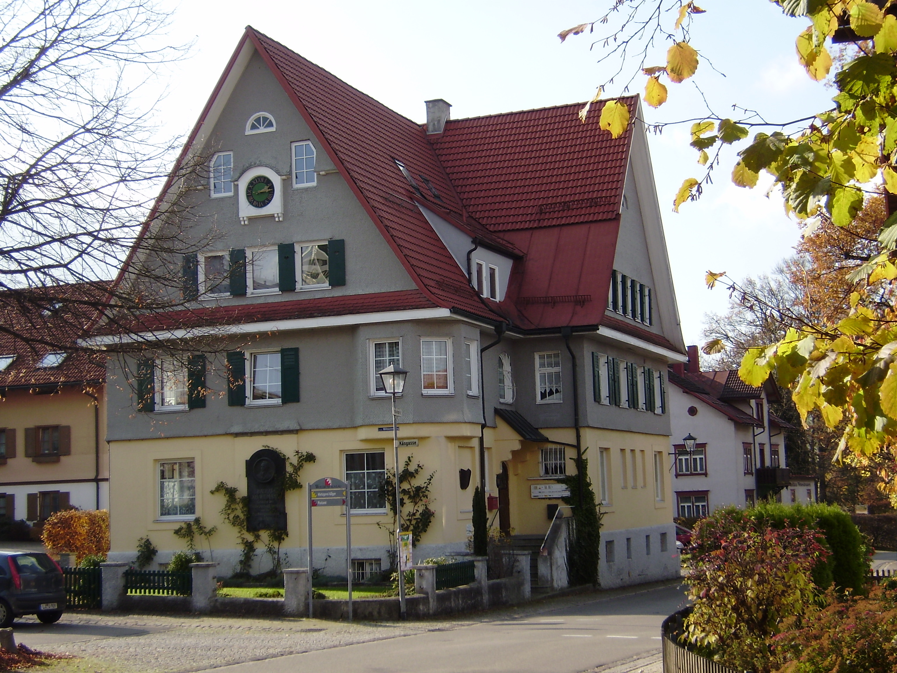 Widmann Haus, Verwaltungs- und Laborgebäude der Sennerei-Lehr- und Versuchsanstalt in Weiler im Allgäu, Bayern, Deutschland